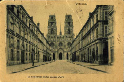 La cathédrale Sainte-Croix est une cathédrale catholique romaine de type gothique située à Orléans dans le département du Loiret et la région Centre-Val de Loire. Elle est le siège épiscopal du diocèse d'Orléans. La cathédrale est dédiée à la Sainte Croix. Дата 11 июля 2012